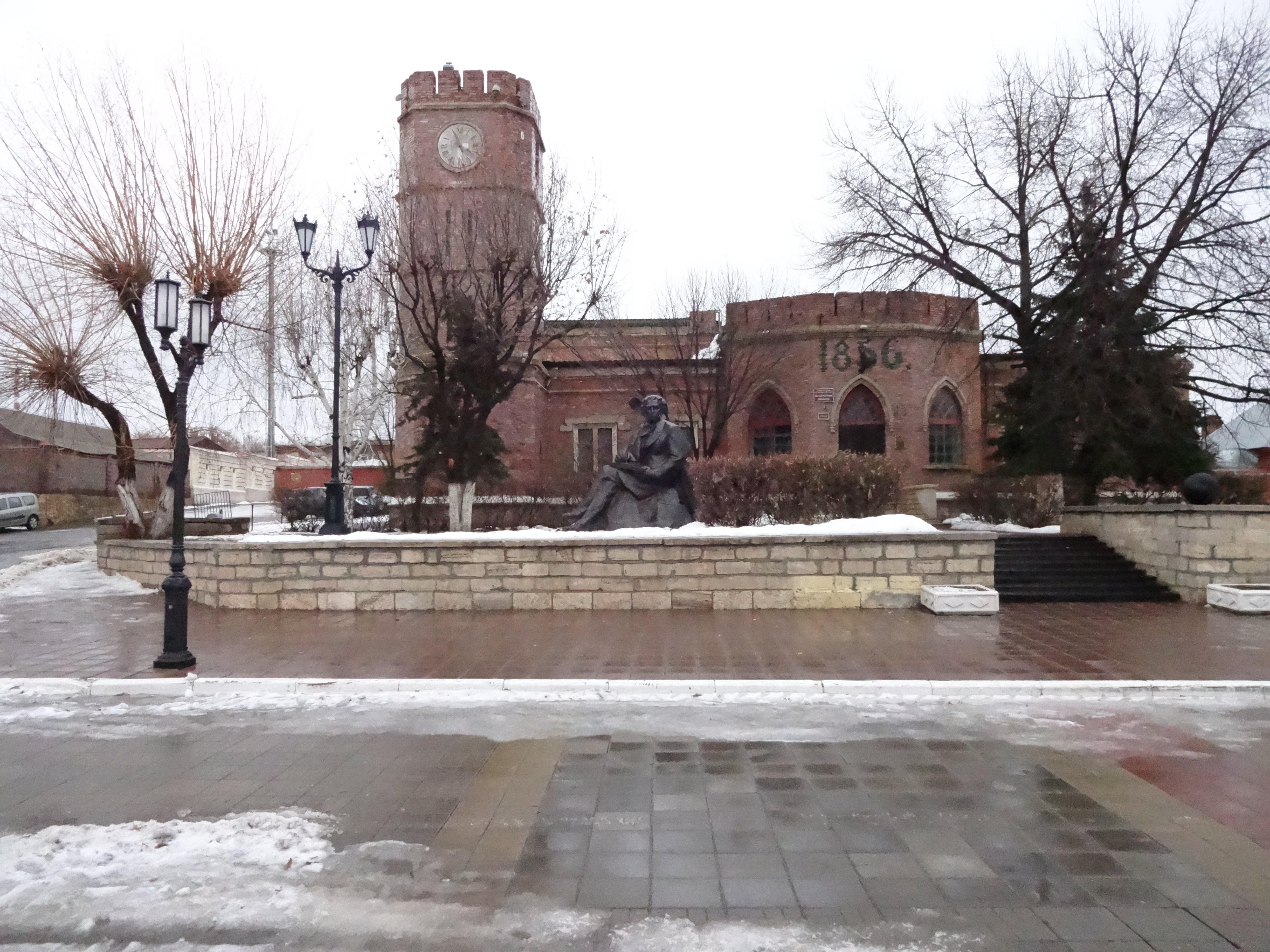 Памятник Пушкину А.С.: улица Набережная (сквер), Оренбург, Оренбургская область